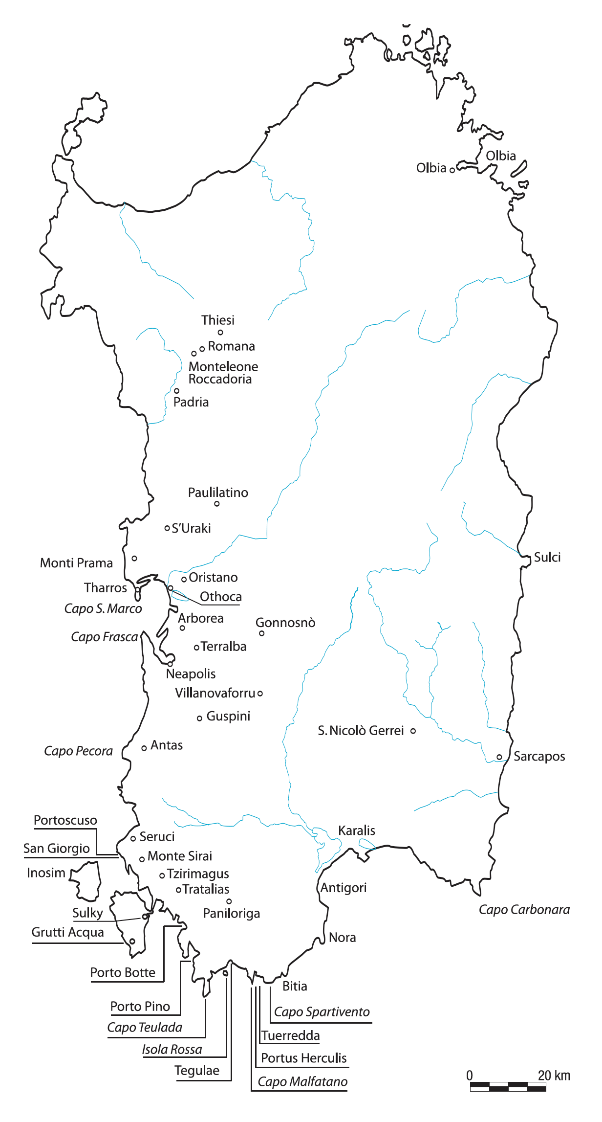 Indica i luoghi conquistati e governati dai fenici e dai punici